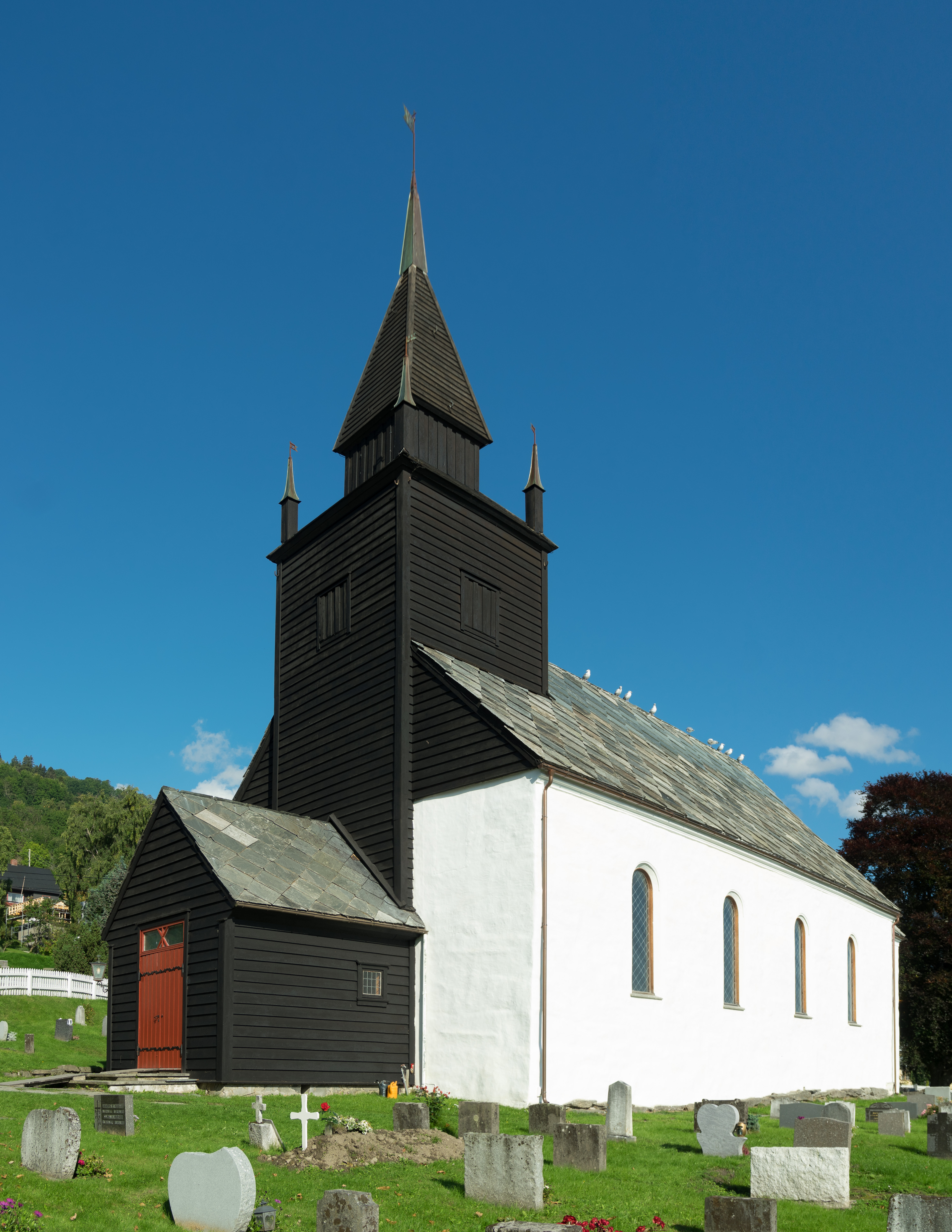 Leikanger kyrkje i Leikanger i Sogn.